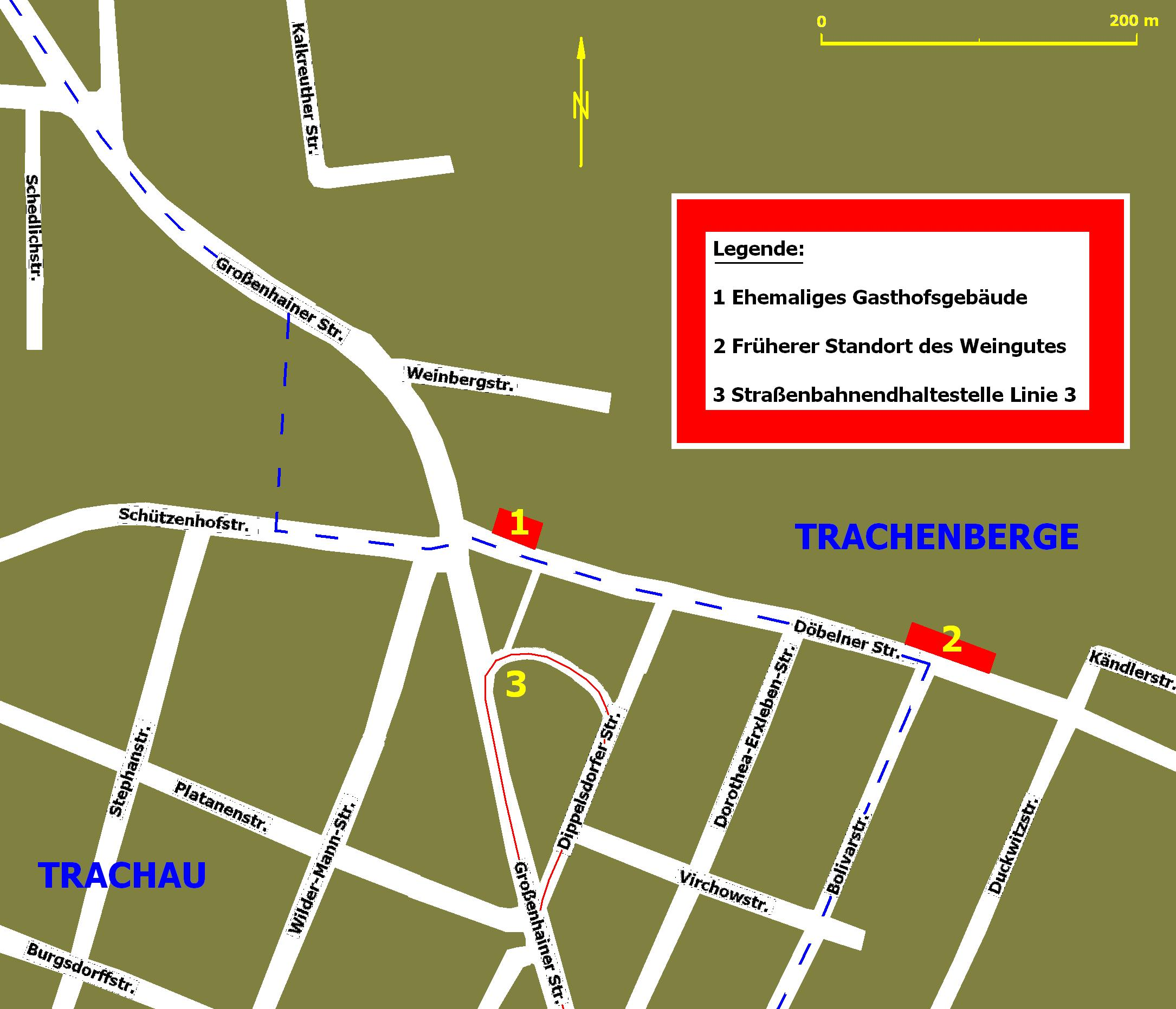 Stadtplanausschnitt des Dresdner Viertels Wilder Mann